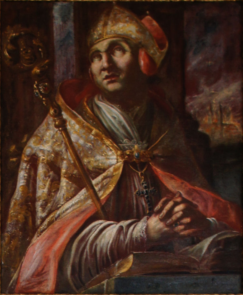 Porträtgemälde von Albert I. von Harthausen, Bischof von Freising, im Fürstengang zwischen Fürstbischöflicher Residenz und Freisinger Dom.